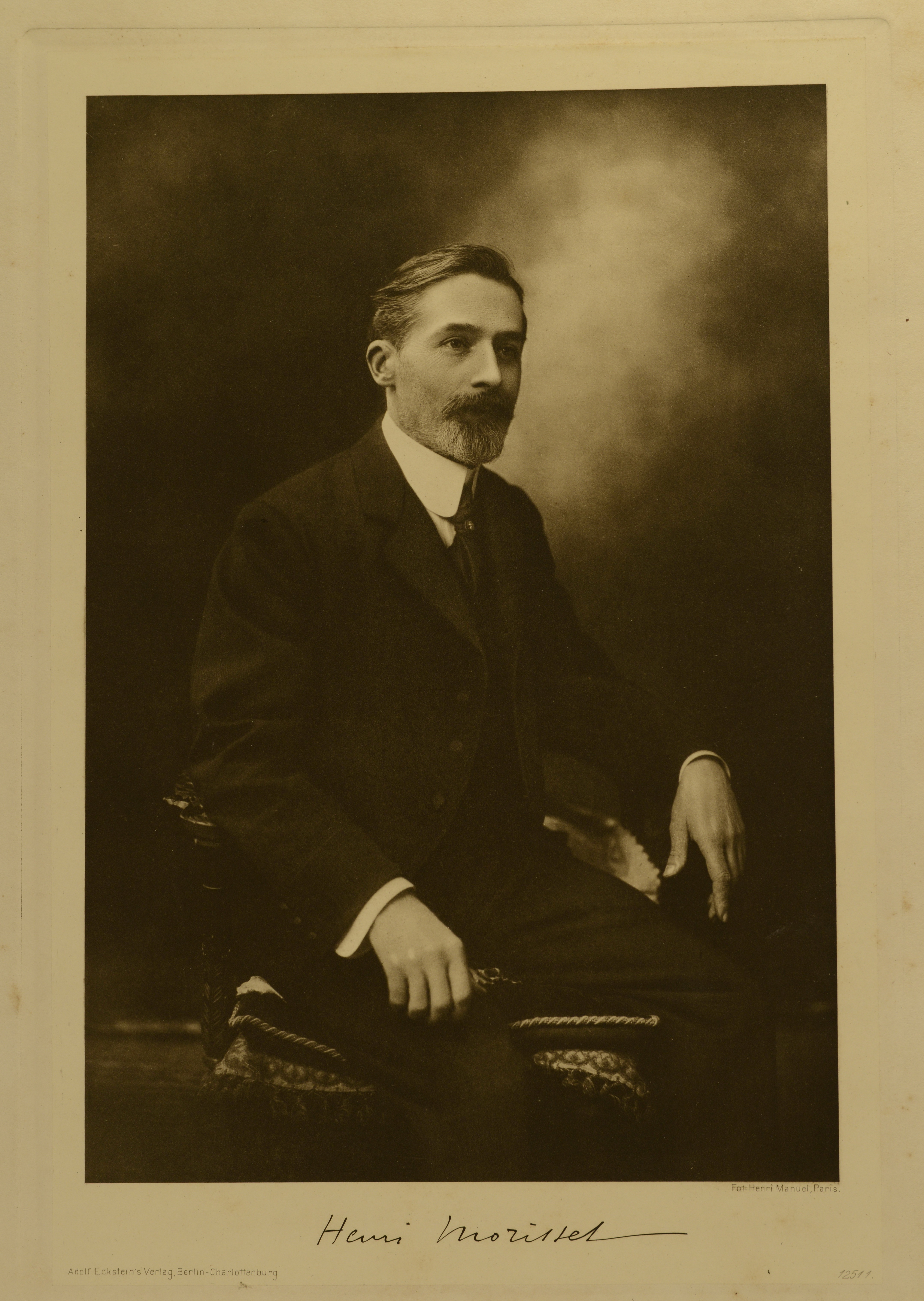 Portrait du peintre Henri Morisset